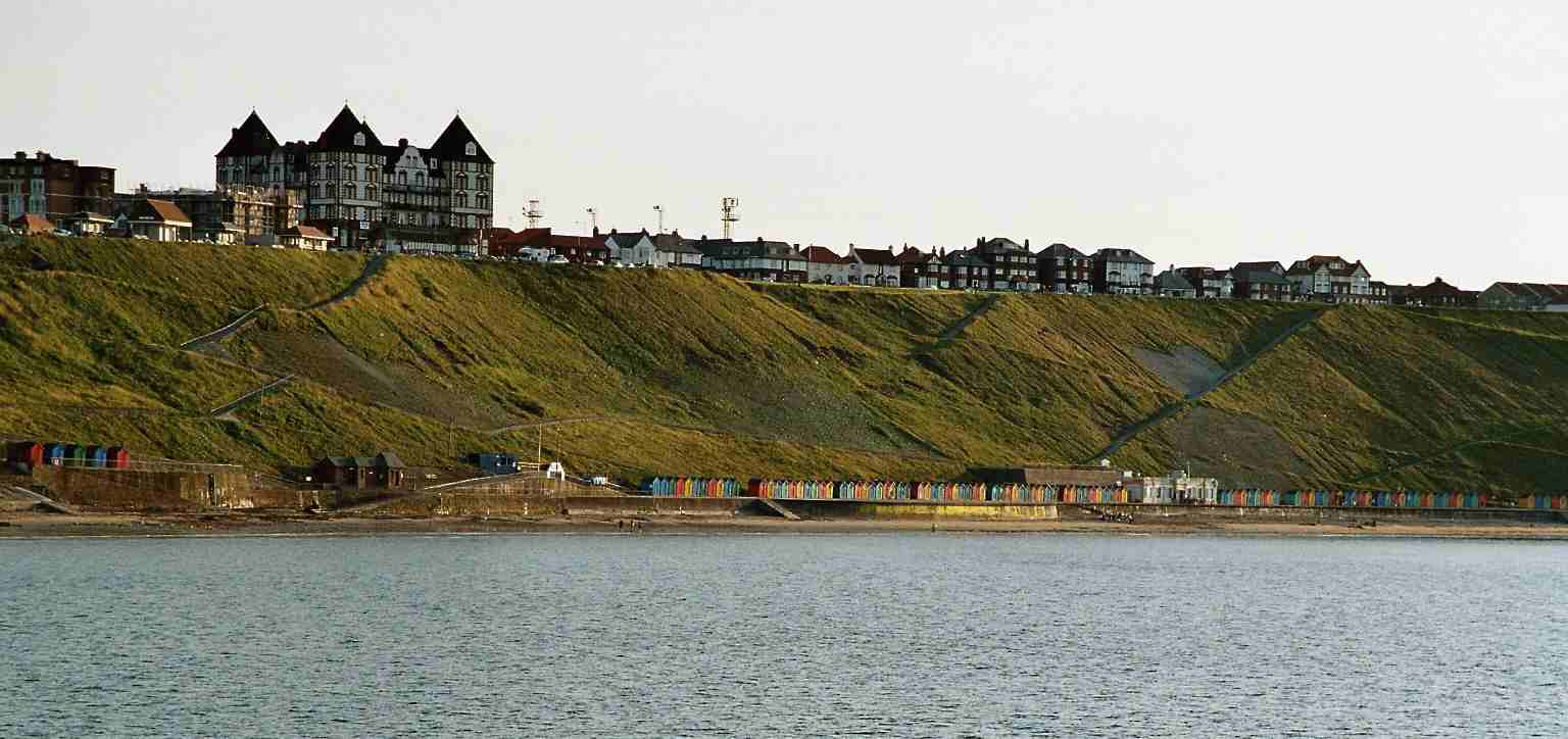 Utsikt fra vestre pir mot Whitby vest. Foto: AEK.